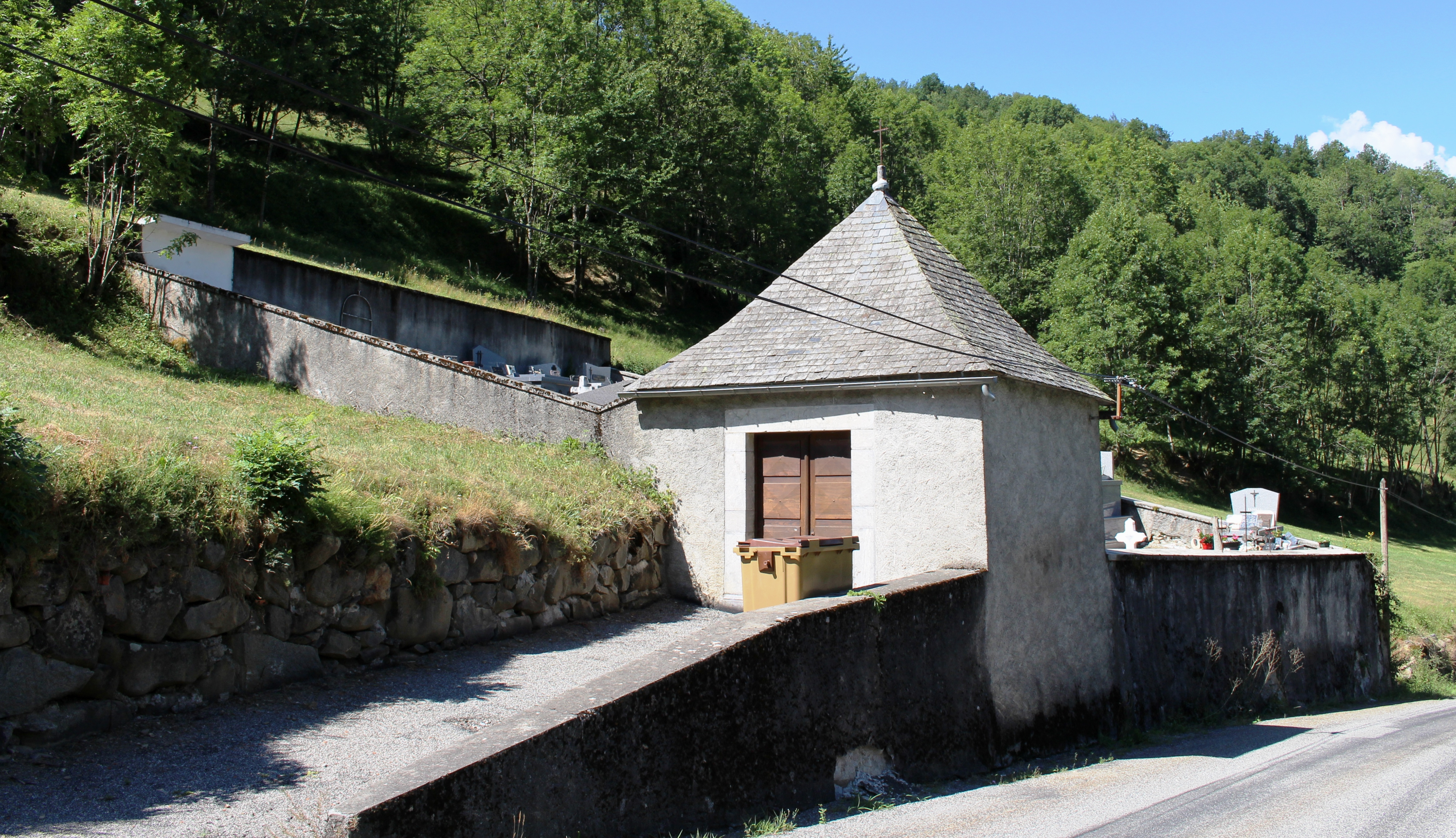 Cimetière de Bareilles (Hautes-Pyrénées)